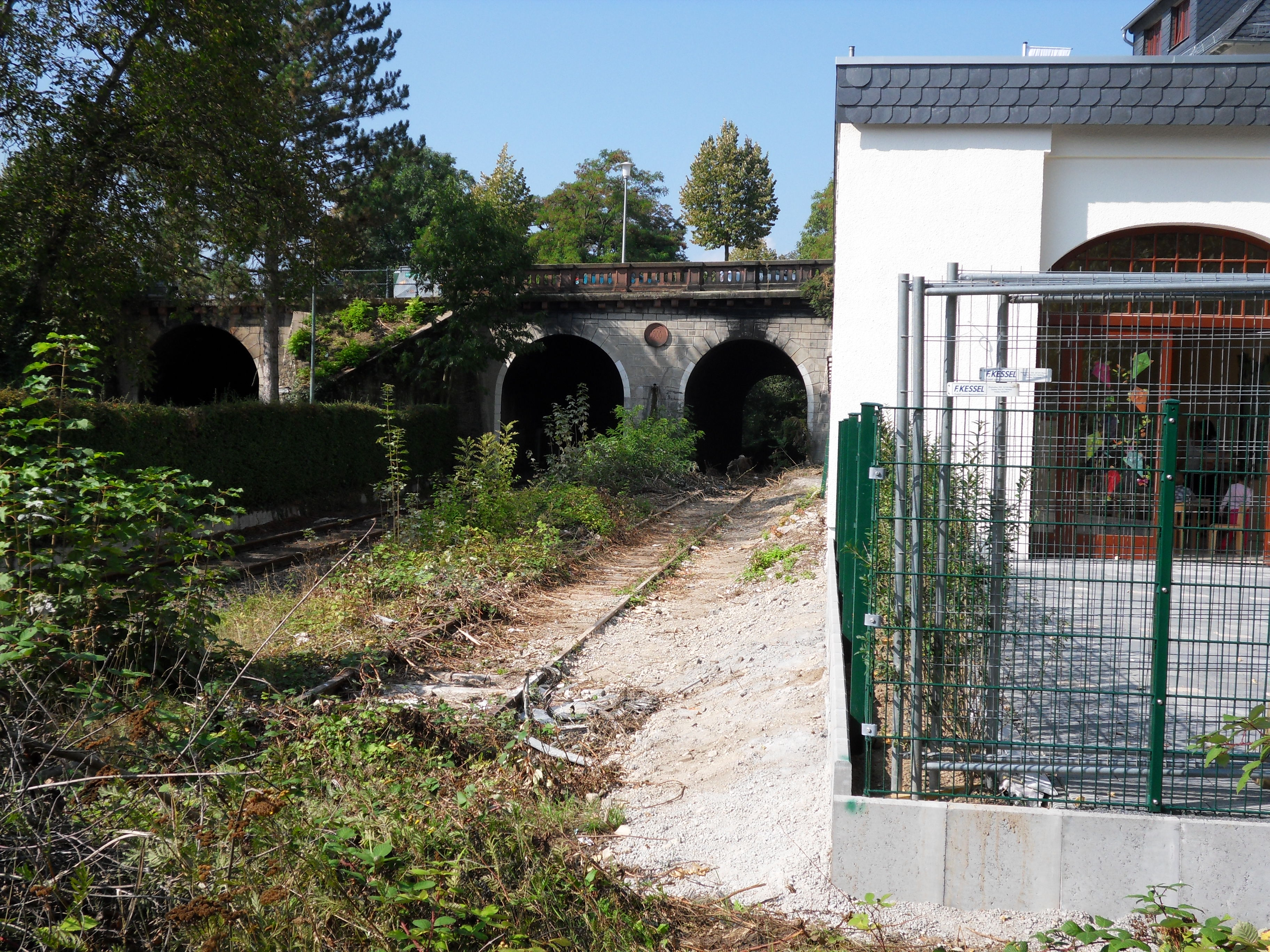 Blick vom früheren Bahnsteig am Bahnhof Landesdenkmal der Aartalbahn in Wiesbaden-Biebrich auf die Gleisanlagen und die Ostportale der Tunnels unter der Biebricher Allee. Die linke Tunnelröhre diente dem Gleisanschluss der Sektkellerei Henkell. Der Bahnhof selbst wurde zu einer Kindertagesstätte mit dem Namen "Kleiner Bahnhof" umgebaut.